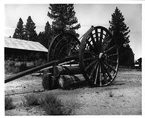 Big Wheel skidder on display at Collier State Park Logging Museum in Oregon, 1961